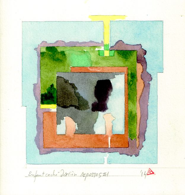 Aquarelle 13x15(cm